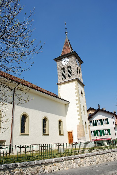 Vue du temple d'Apples (canton de Vaud)